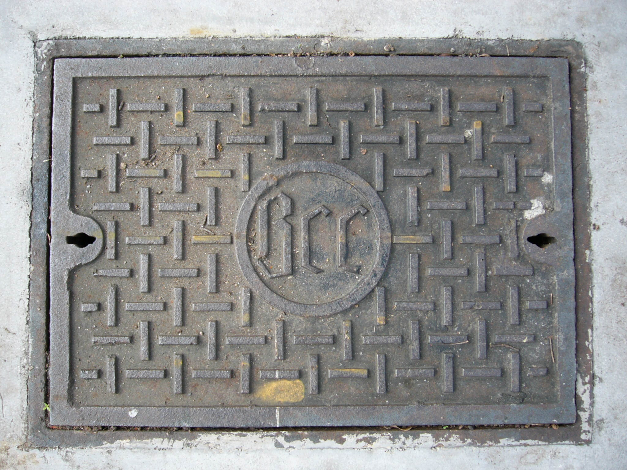 中文（台灣）: 中華民國總統府大門對面的中國廣播公司長方形人孔蓋，中央圓形圖案為鑄造時中國廣播公司商標。